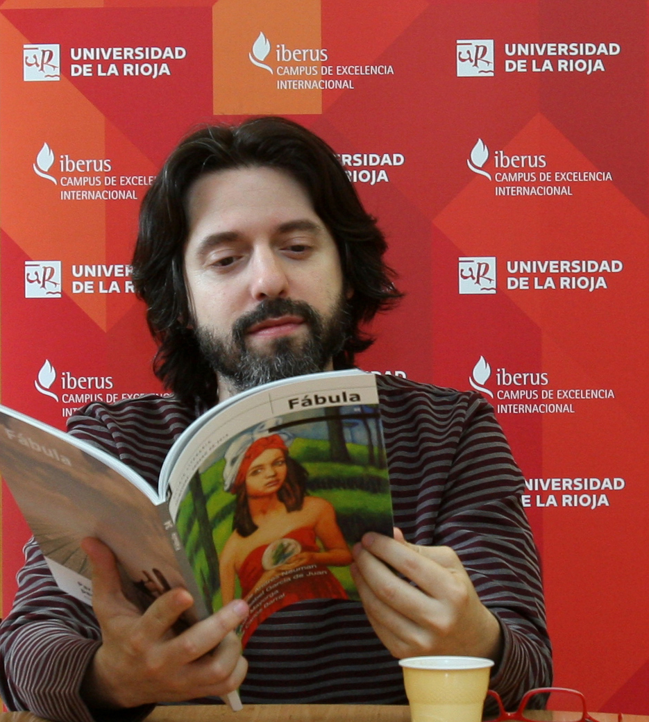 El escritor Andrés Neuman, en la Universidad de La Rioja.